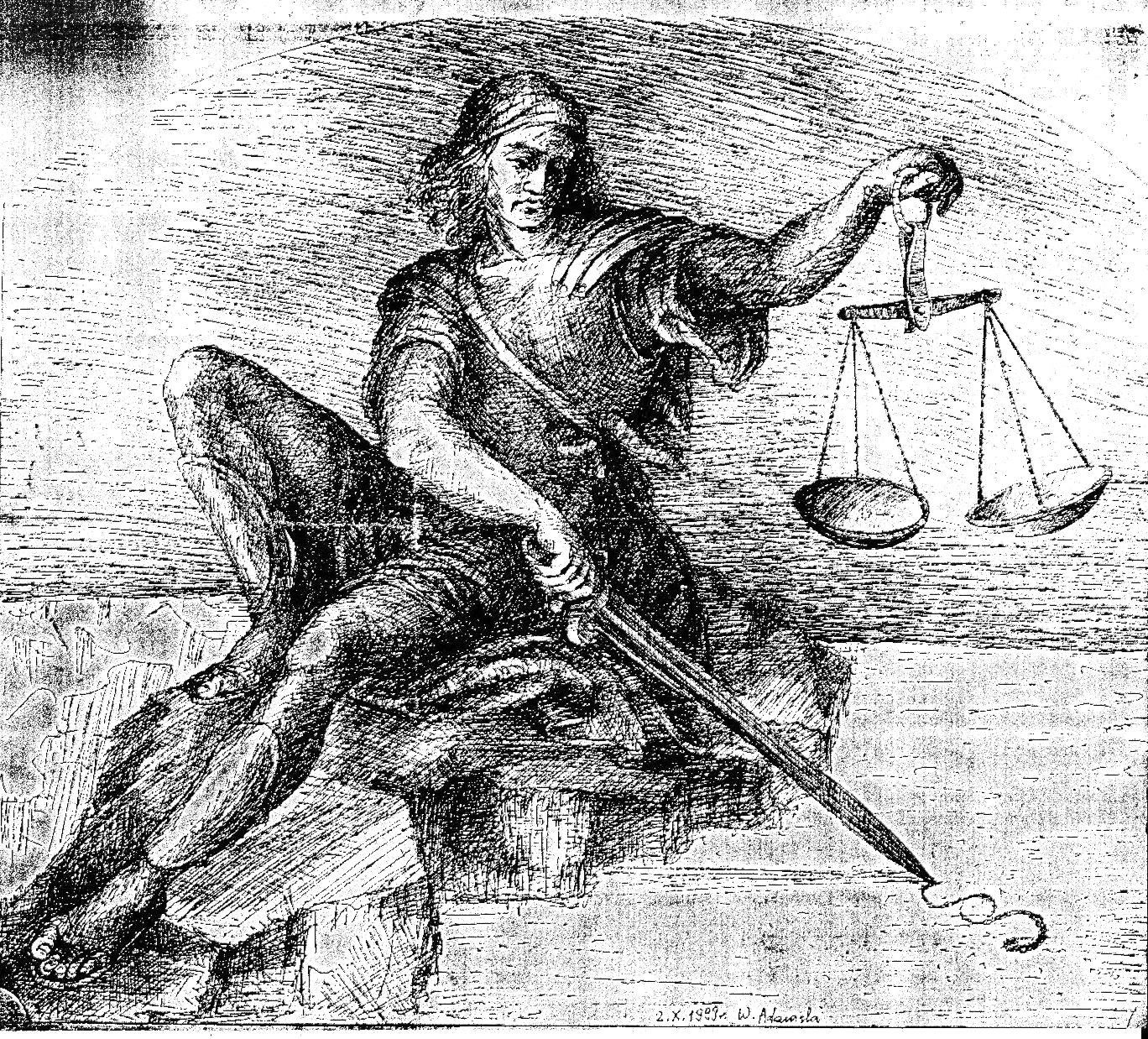 Justice by Wiesław Adamski